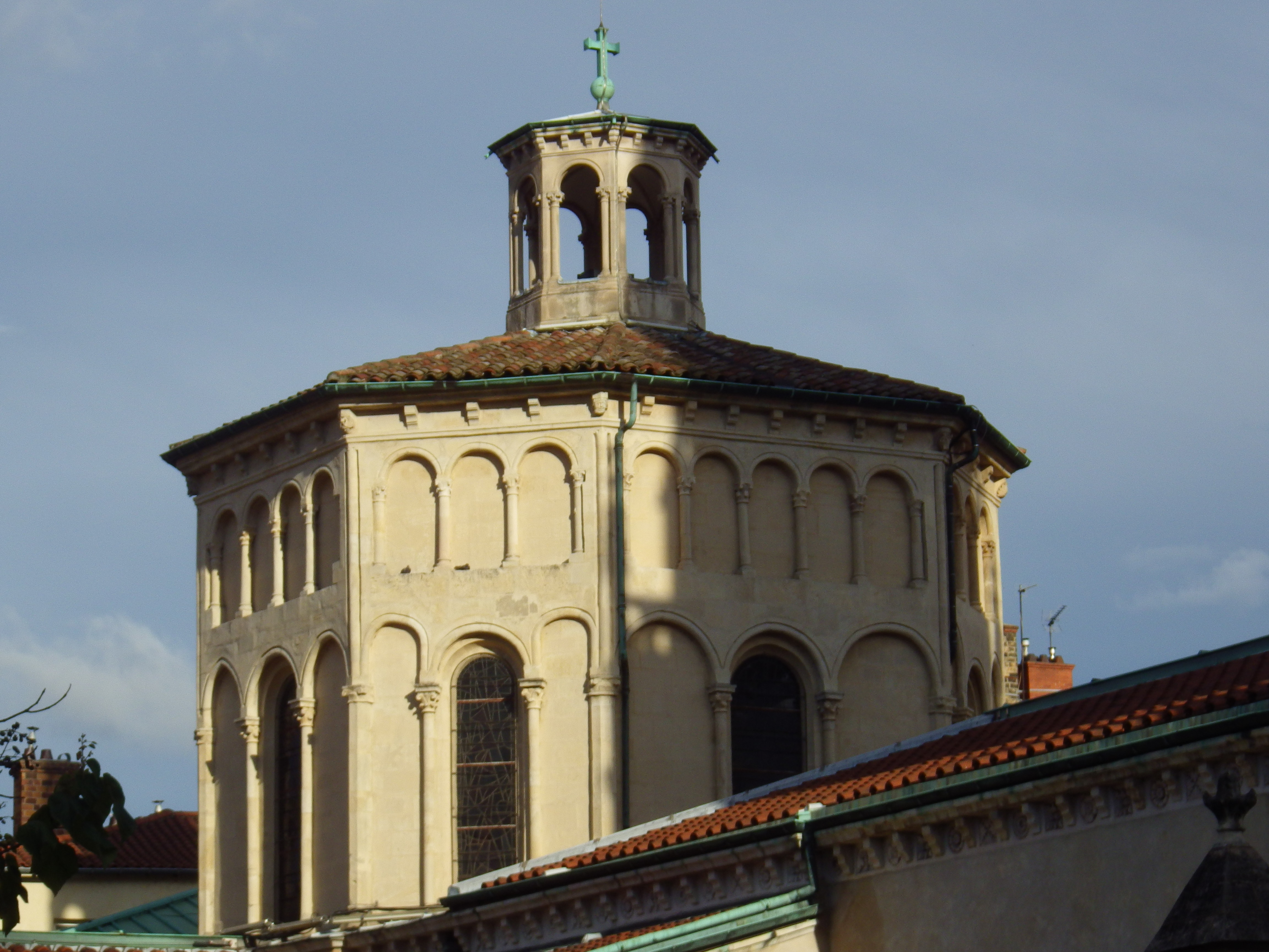 Lanterne renaissance chevet de l'église Saint-Paul vieux Lyon